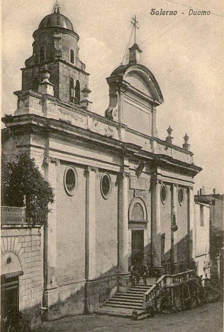 Facciata prima del restauro radicale degli anni 50